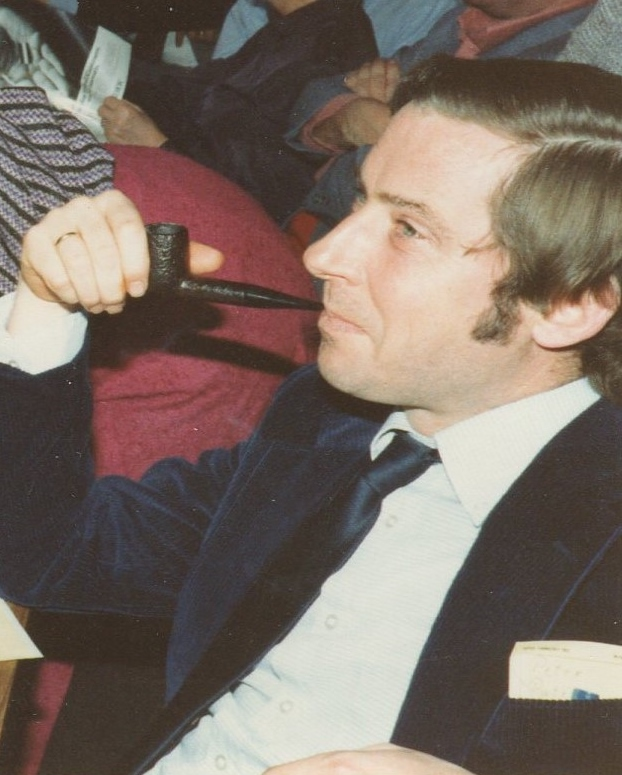 Porträt Peter Paterna MdB mit Pfeife